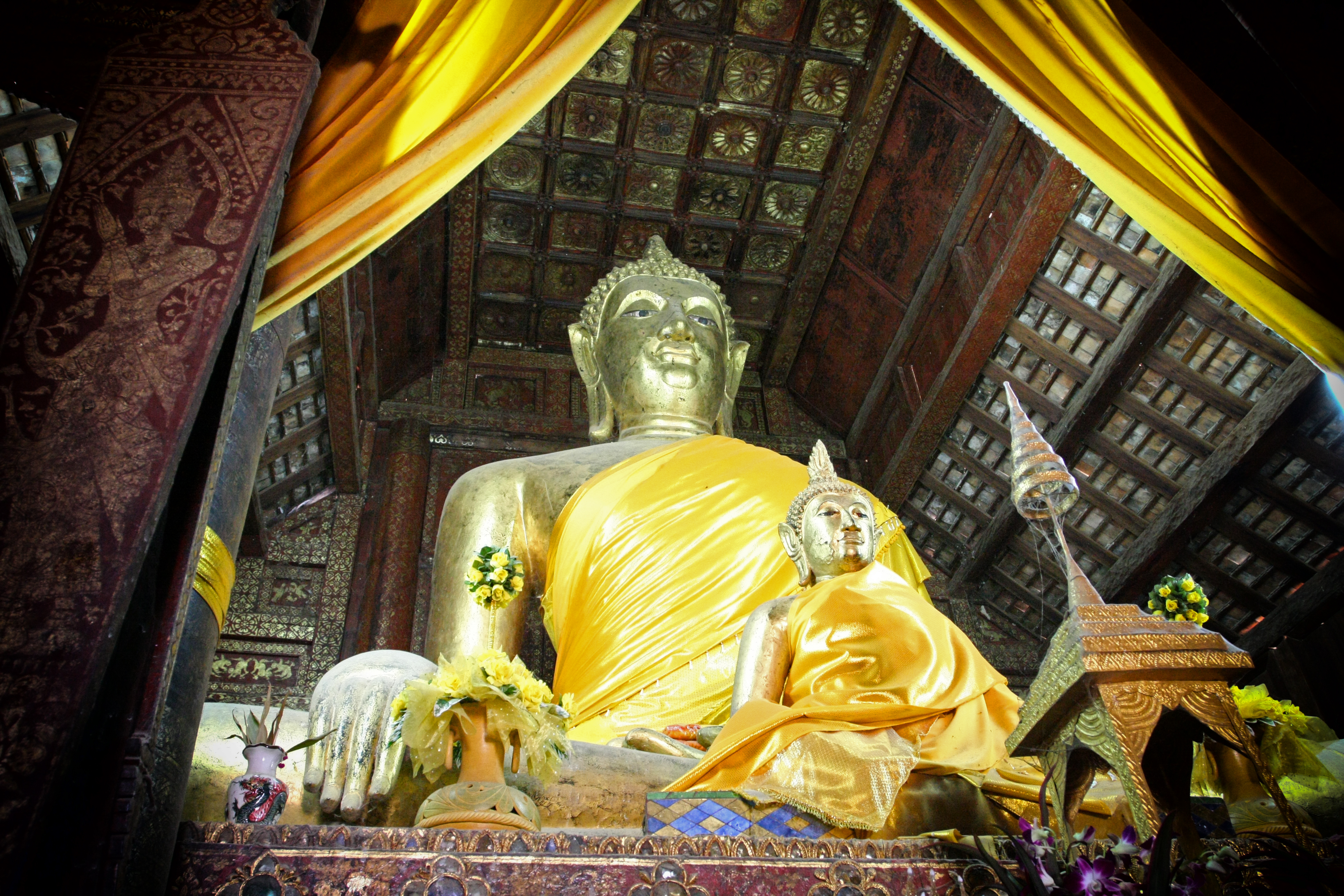 วัดพระธาตุลำปางหลวง